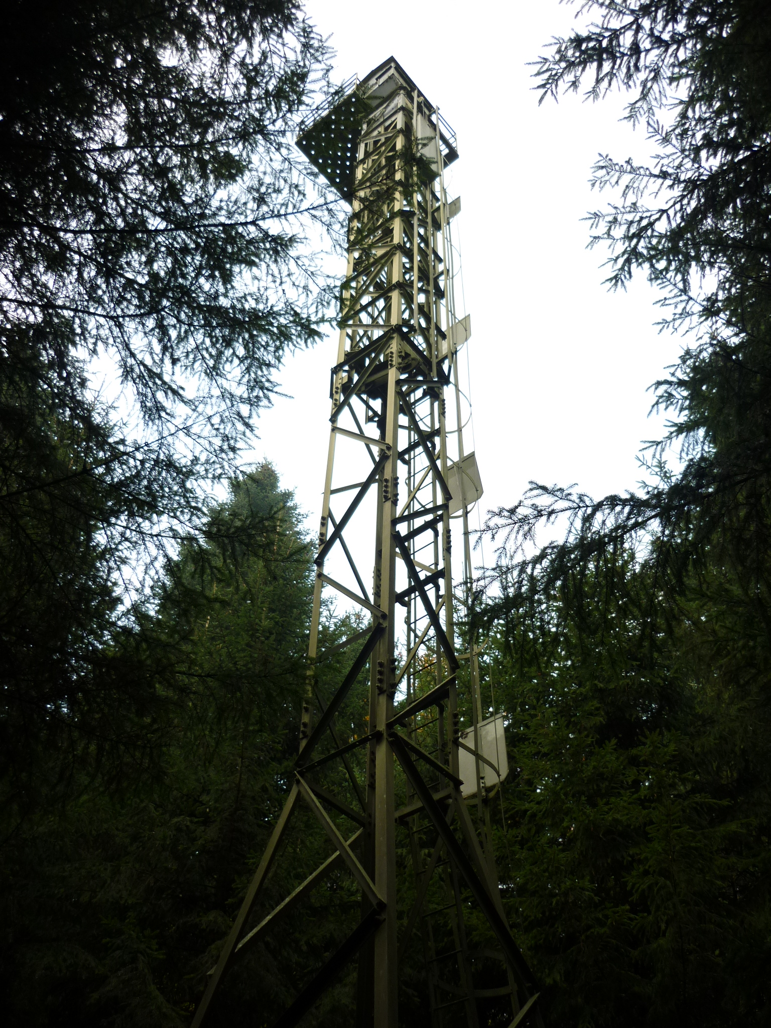 Artilleriebeobachtungsturm, Gebenstorfer Horn AG, Schweiz